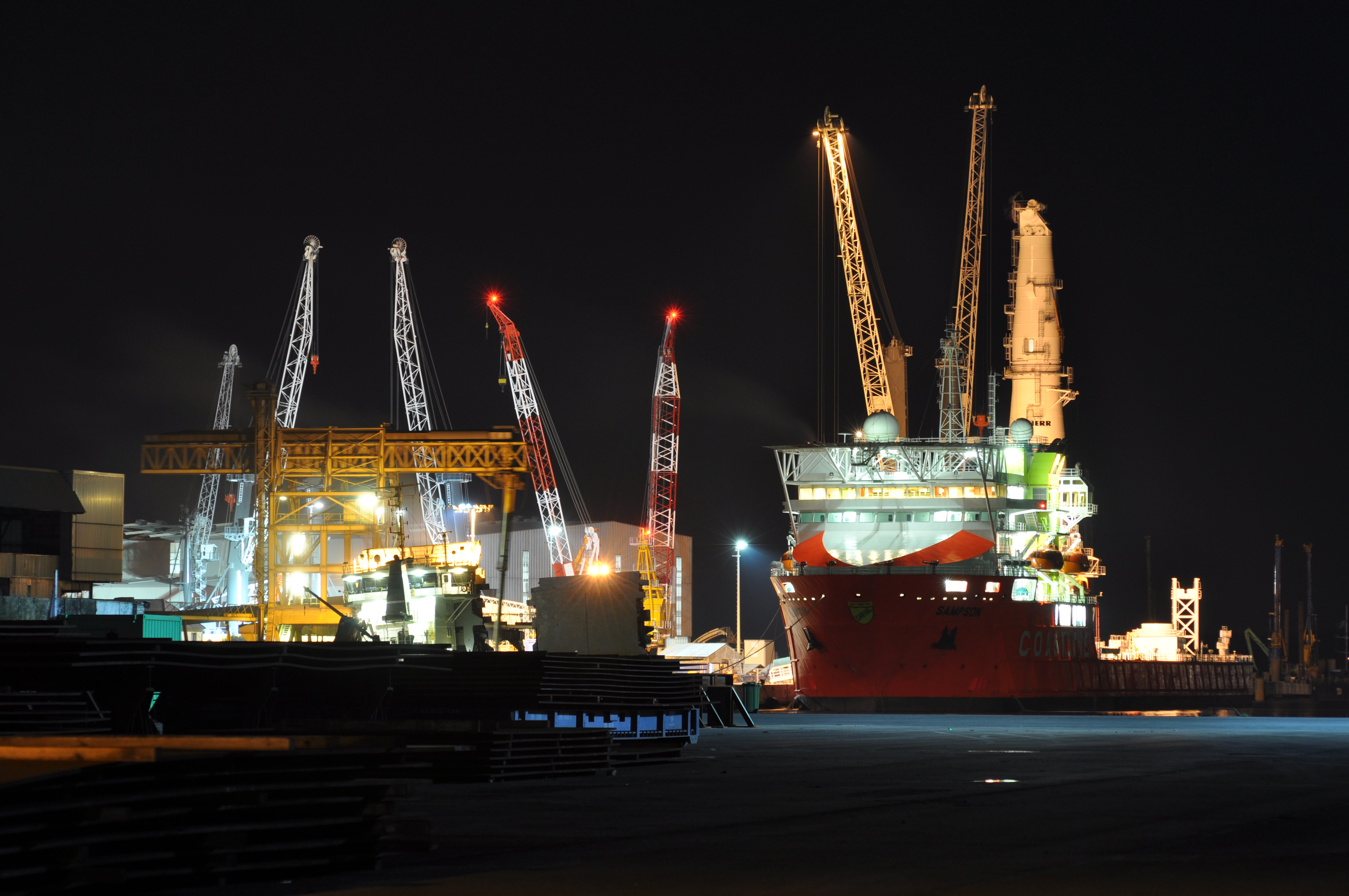 Die OSA Sampson am Montagestandort Rostock. Hier vor der Installation des Drehkranes.